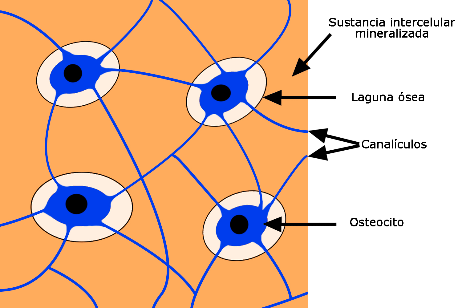 Esquema histológico del tejido óseo en el que son visibles los osteocitos.